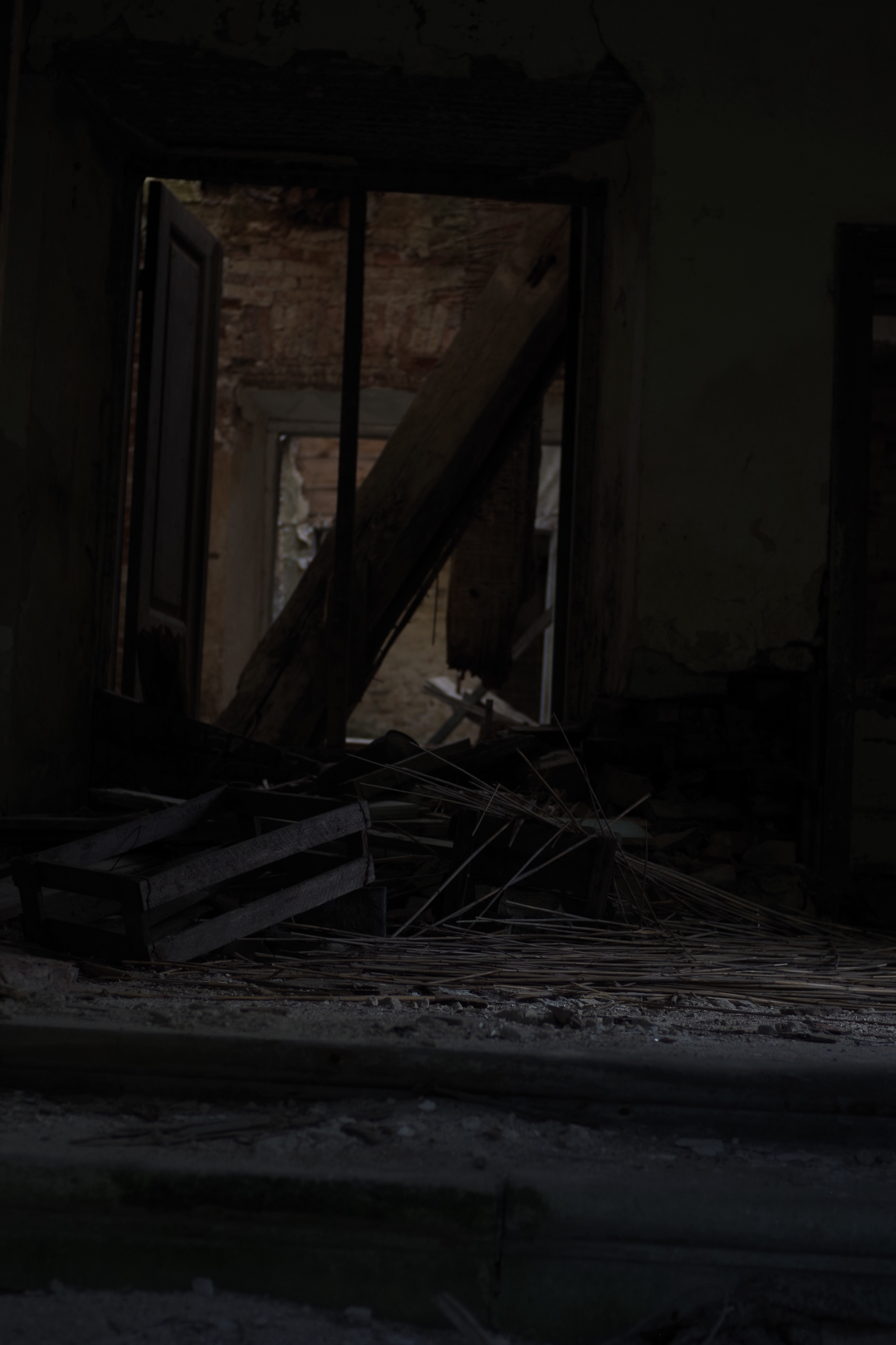 Pihtla mõis Saaremaal Pihtla vallas. (Foto: 2014)